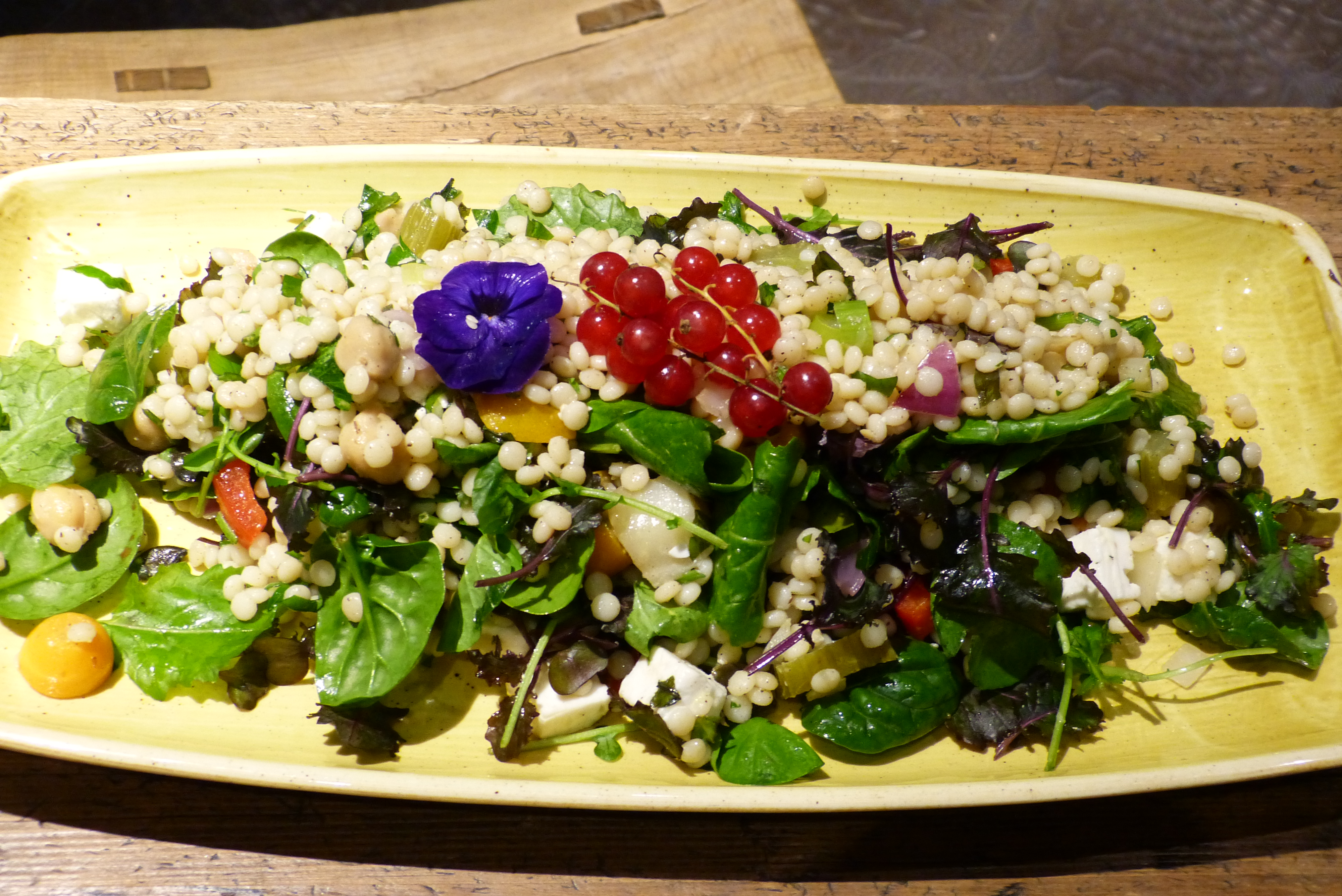 Ptitim-Salat ("Israelischer Couscous") auf dem Wikipedia-Stammtisch Augsburg am 20.11.2016 im Picnic, Augsburg